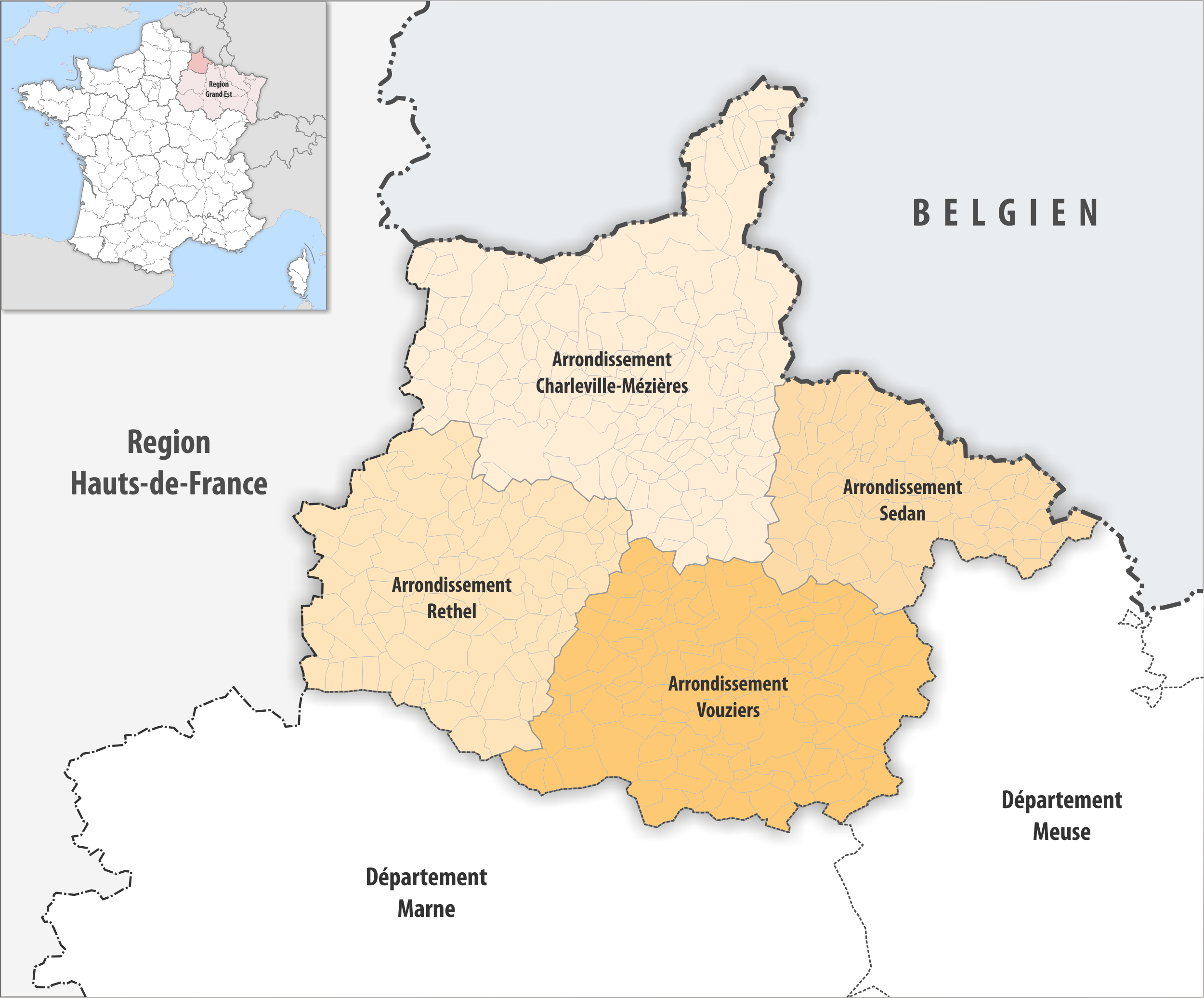 Gemeinden und Arrondissemente im Departement Ardennes